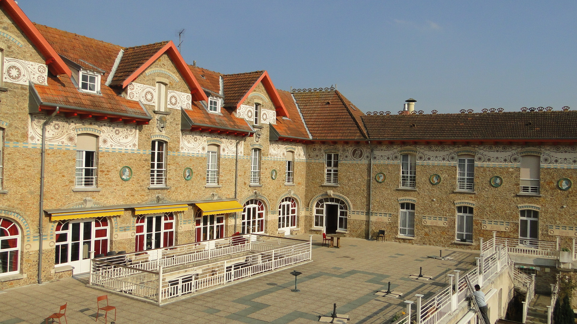 Vue de la cour